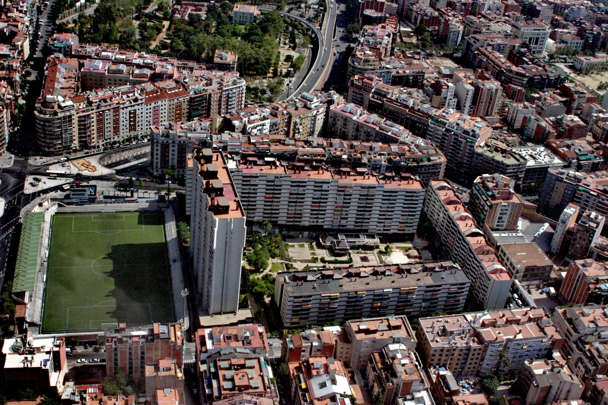 Vista aèria del camp de futbol del Club Esportiu Europa de Barcelona